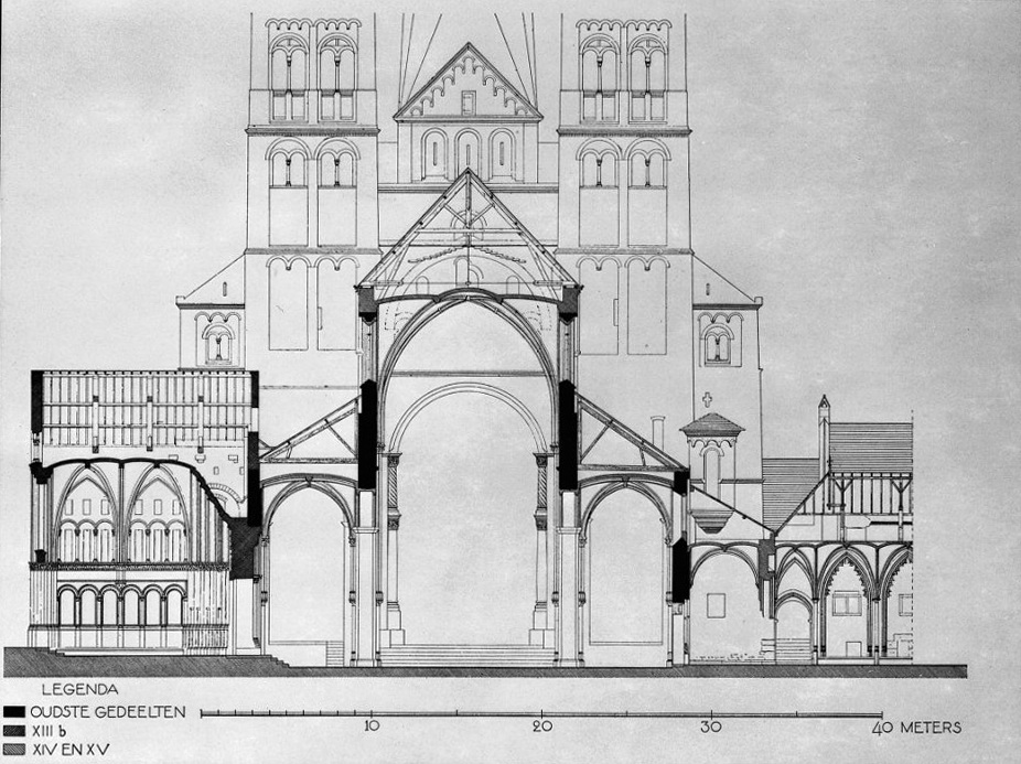 Sint-Servaaskerk: tekening doorsnede van het schip. Links het Bergportaal, rechts de kruisgang.